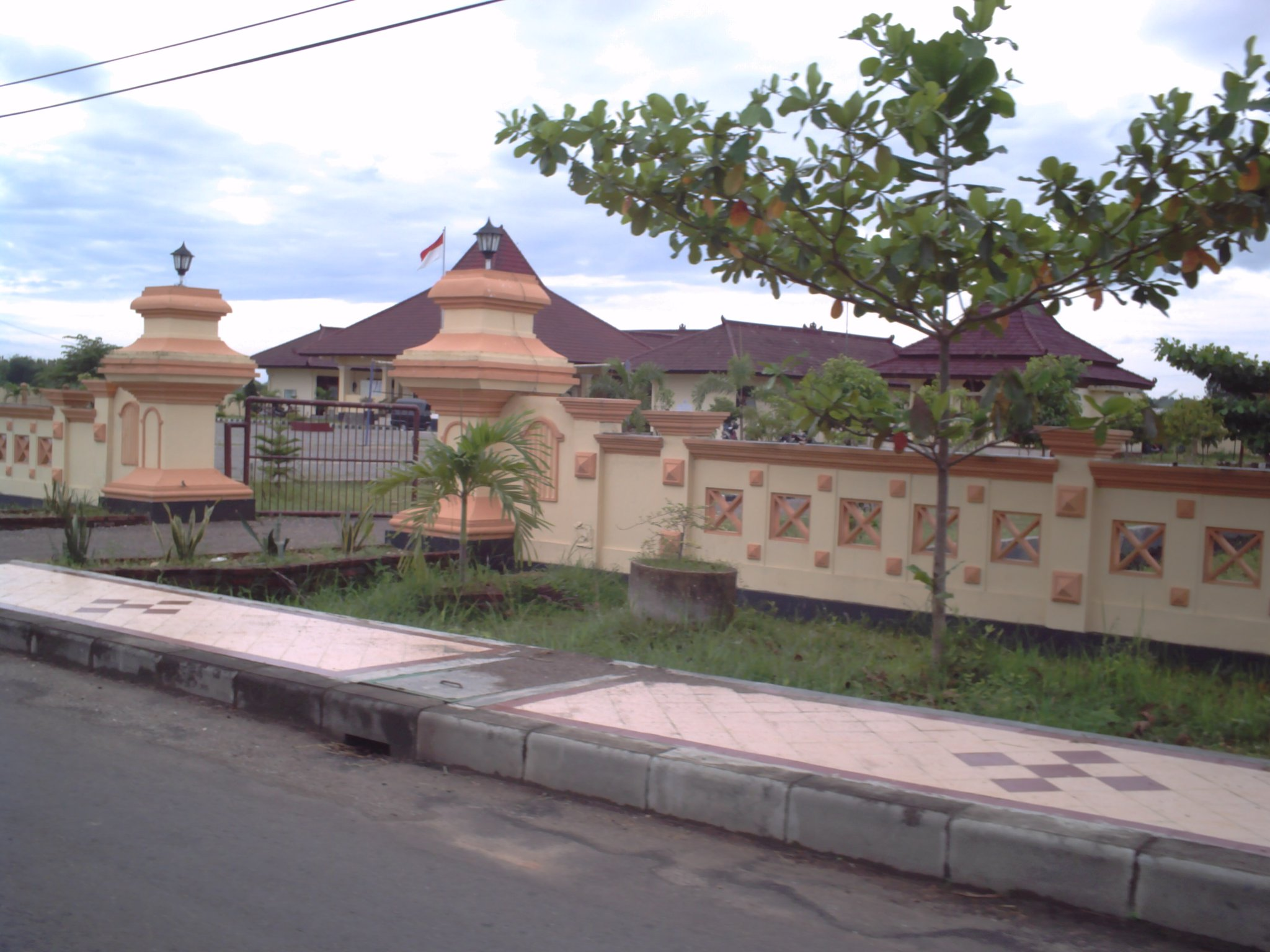 kenduruan